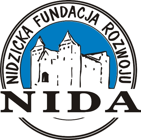 Logotyp Nidzickiej Fundacji Rozwoju NIDA